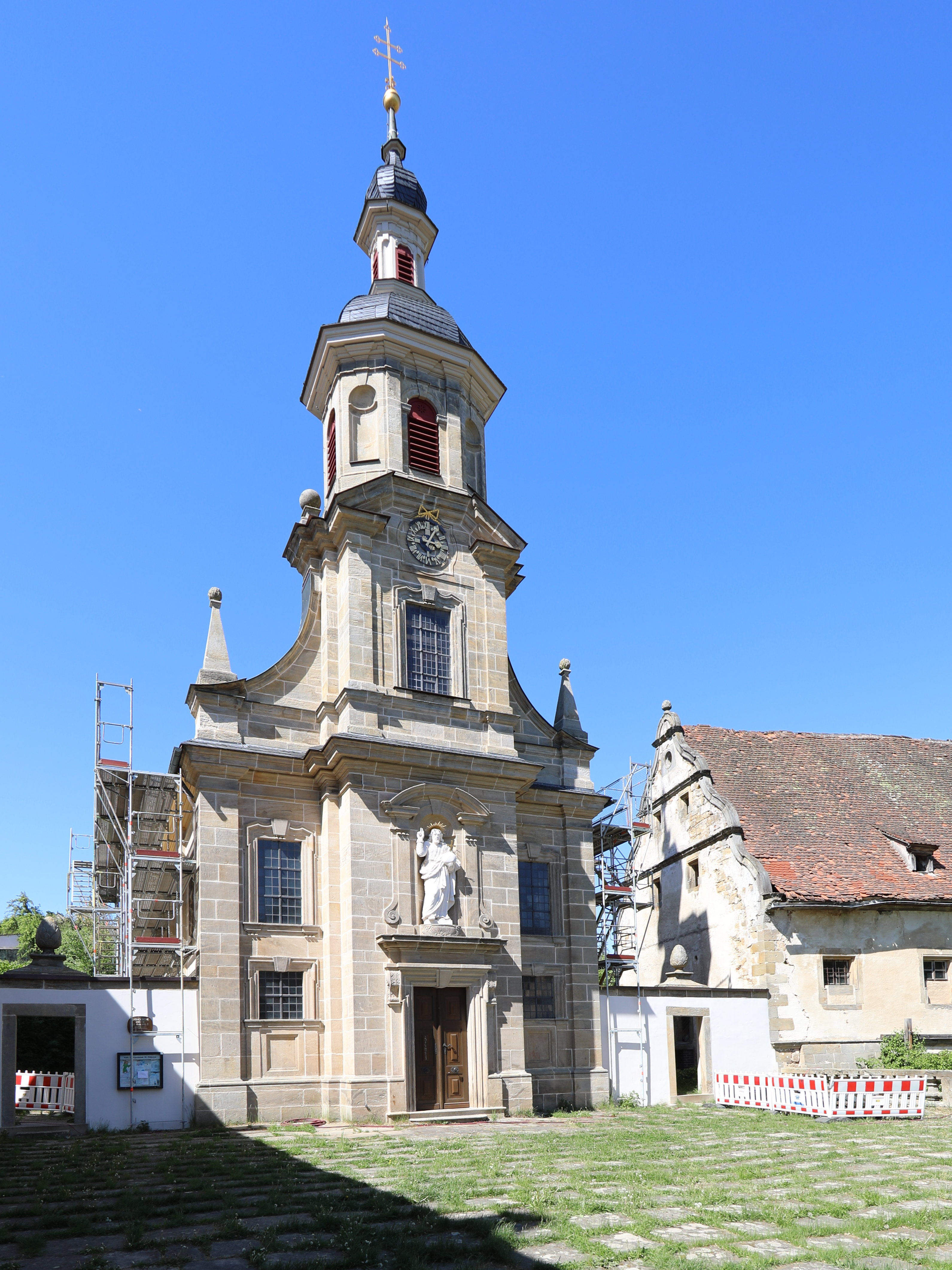 Gereuth, St. Philippus